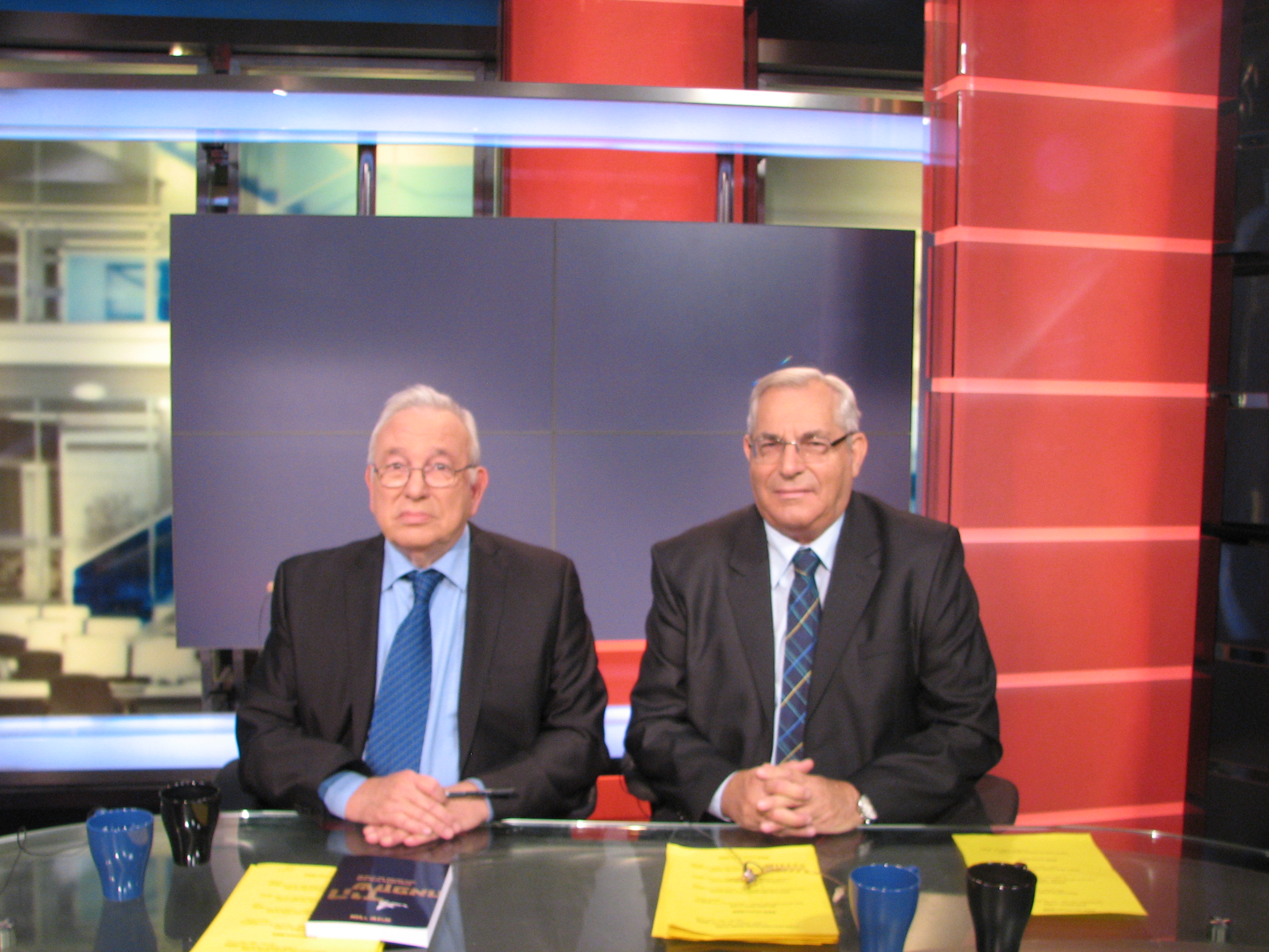 Mordechai "Moti" Kirschenbaum is an Israeli media personality and documentarian. מרדכי (מוטי) קירשנבאום הוא עיתונאי, איש טלוויזיה ורדיו ישראלי. חתן "פרס ישראל" לאמנות הרדיו, הטלוויזיה והקולנוע